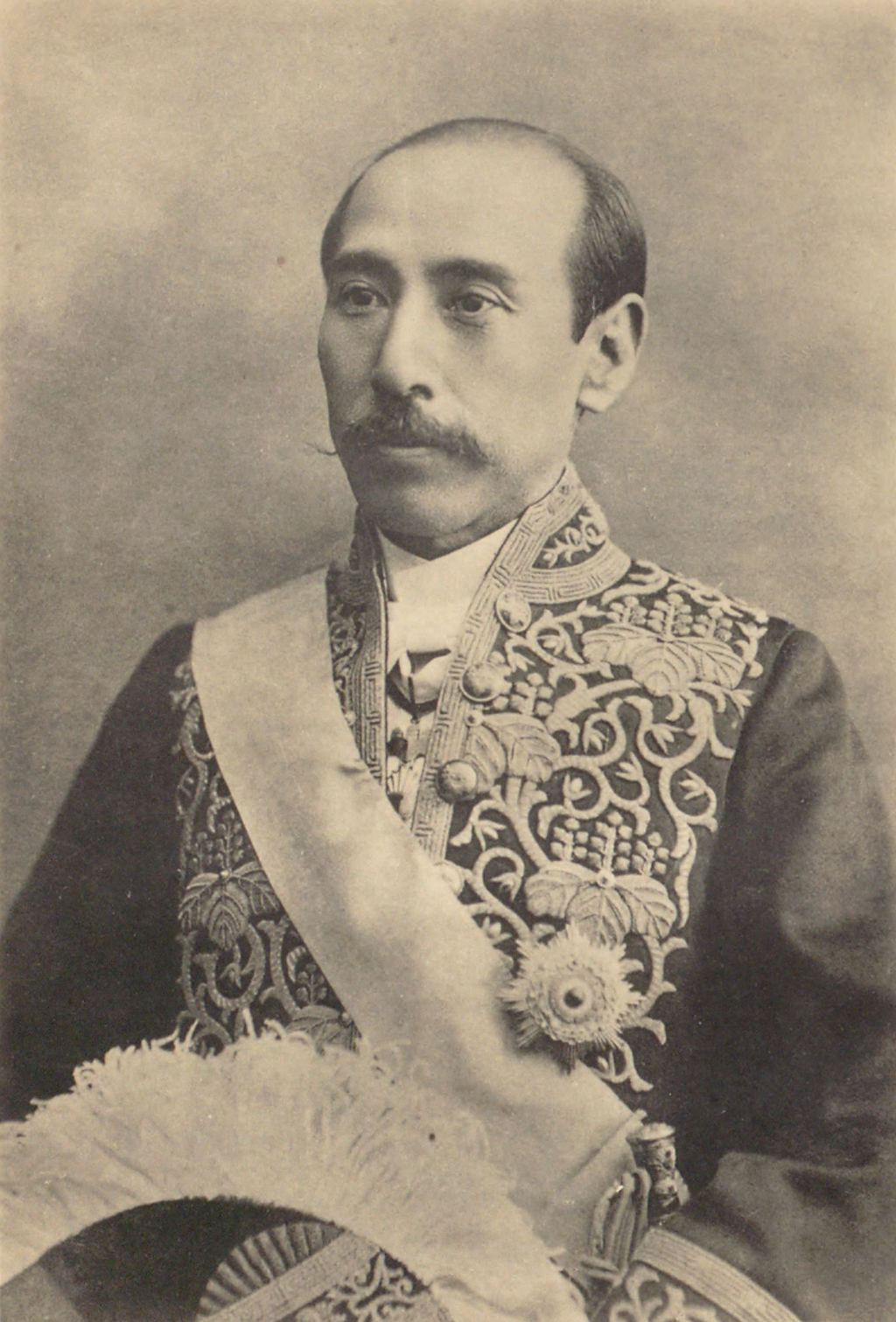 矢野文雄（やの ふみお）慶應義塾卒。郵便報知新聞副主筆、太政官大書記官兼統計院幹事、立憲改進党結成、宮内省式部官、清国駐箚特命全権公使、大阪毎日新聞社副社長。